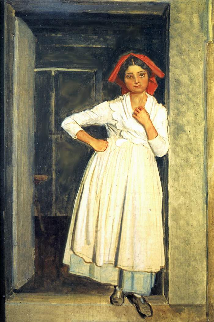 Александр Иванов: Девушка из Албано, стоящая в дверях